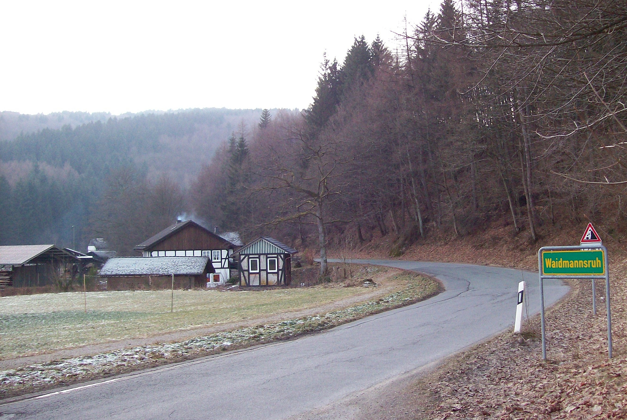 Schmallenberg-Waidmannsruh (Germany)